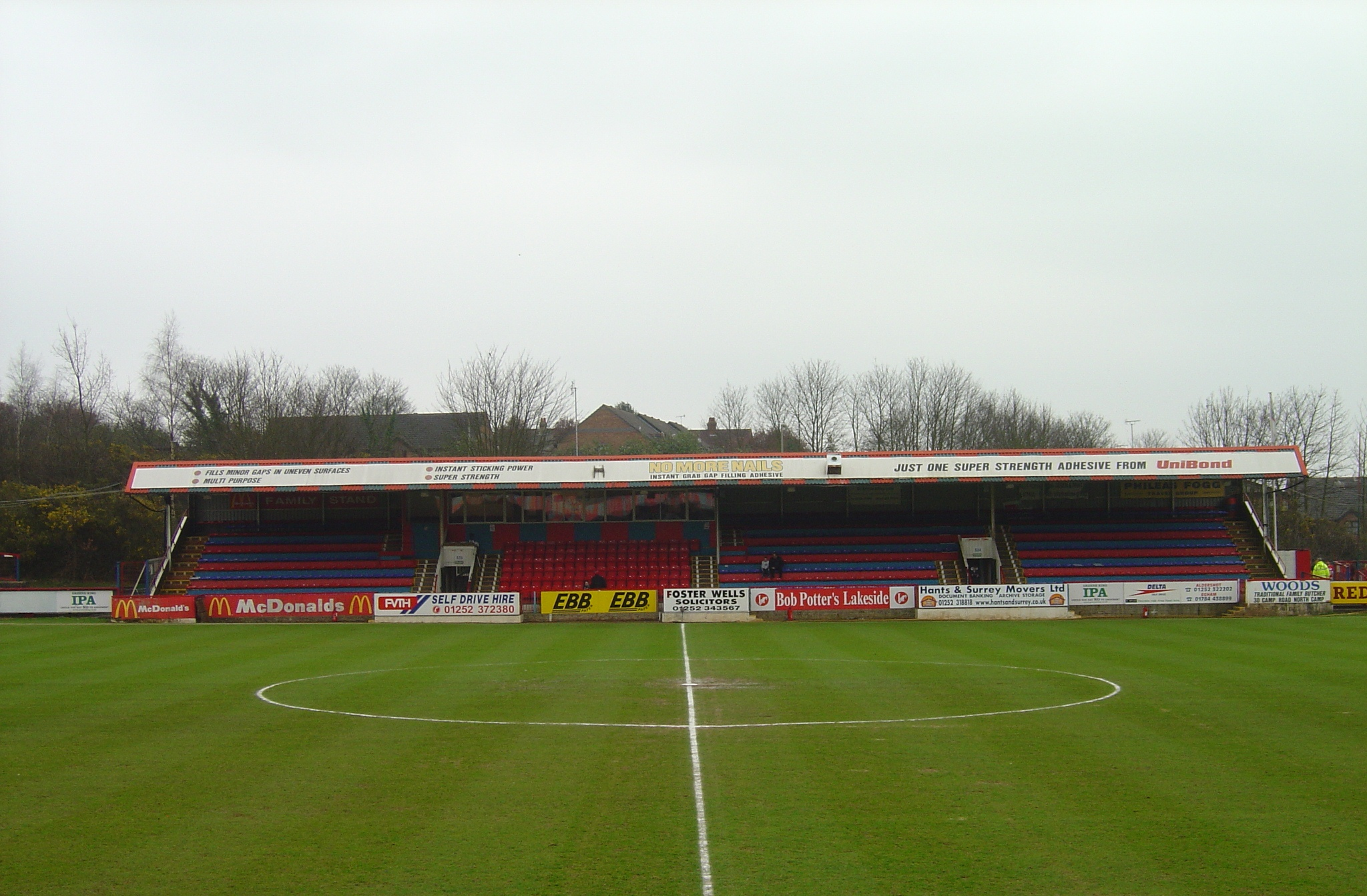 Recreation Ground (Aldershot)